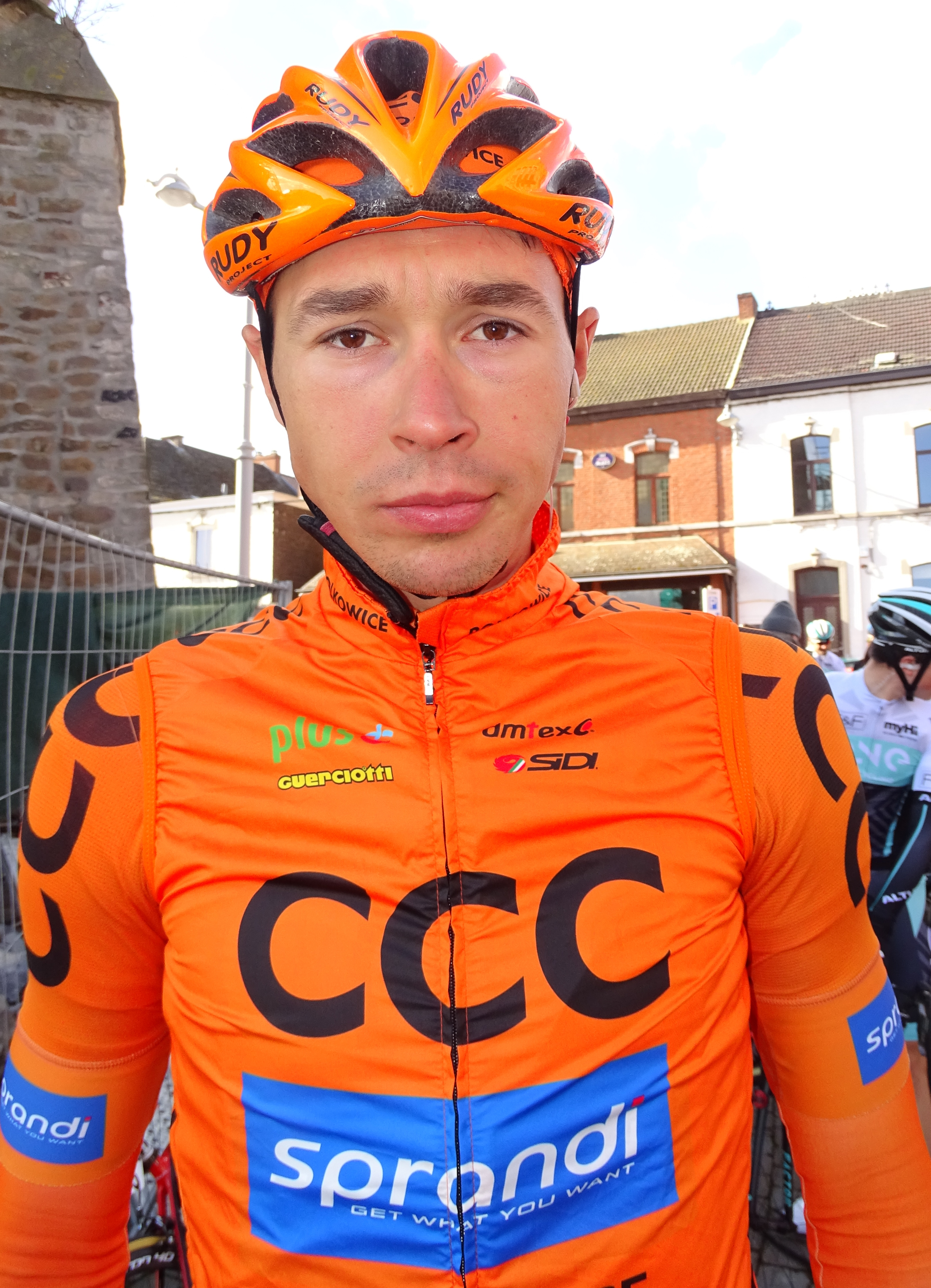 Reportage réalisé le mercredi 2 mars à l'occasion du départ du Samyn des Dames 2016 et du Samyn 2016 à Quaregnon, Belgique.